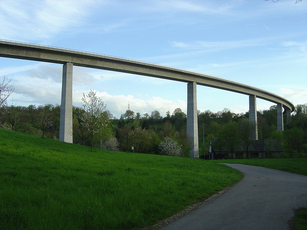 Foto vom Körchtalviadukt bei Ostfildern-Nellingen. Standort des Fotografen an der Kläranlage.